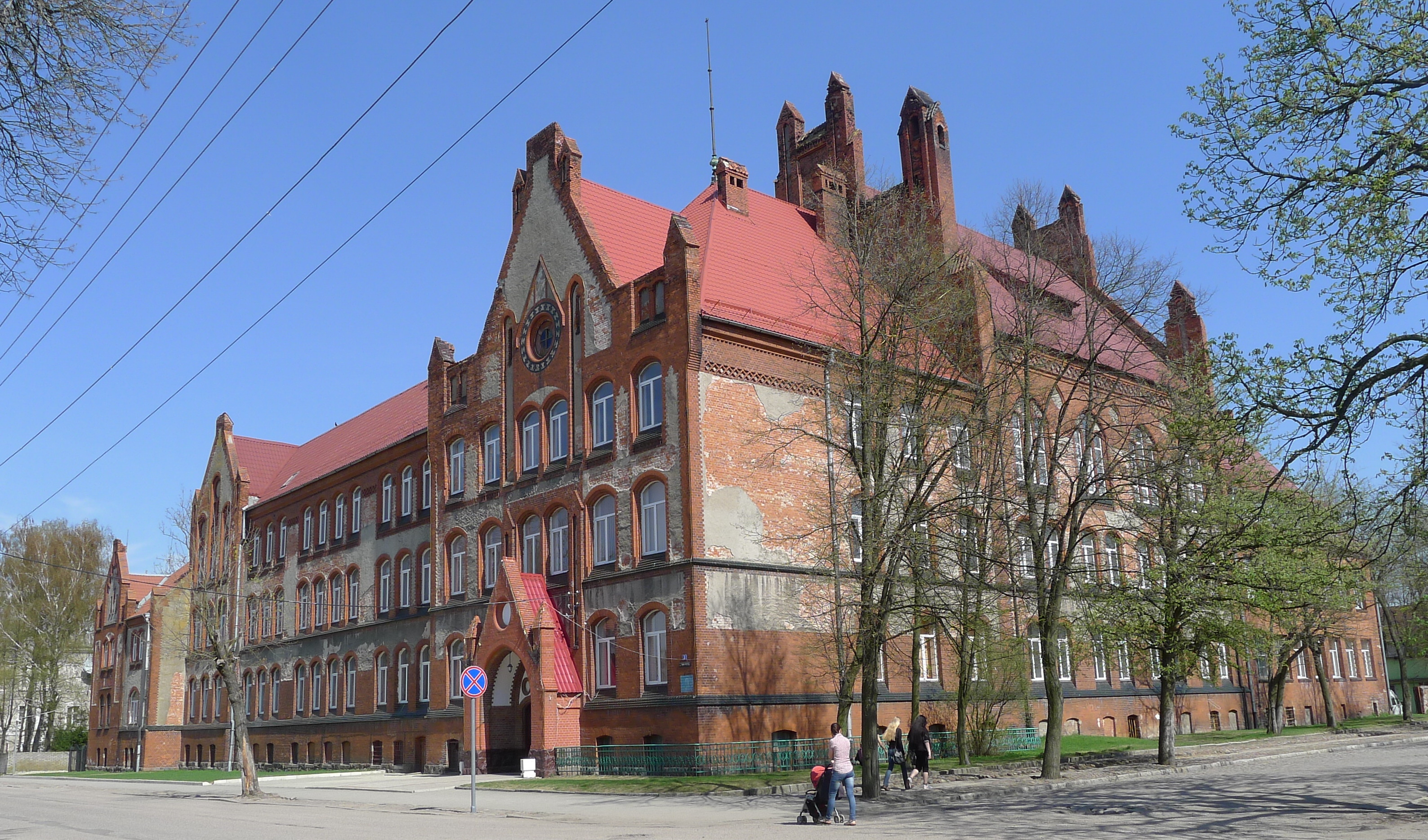 Friedrichsgymnasium in Gumbinnen / Gussew